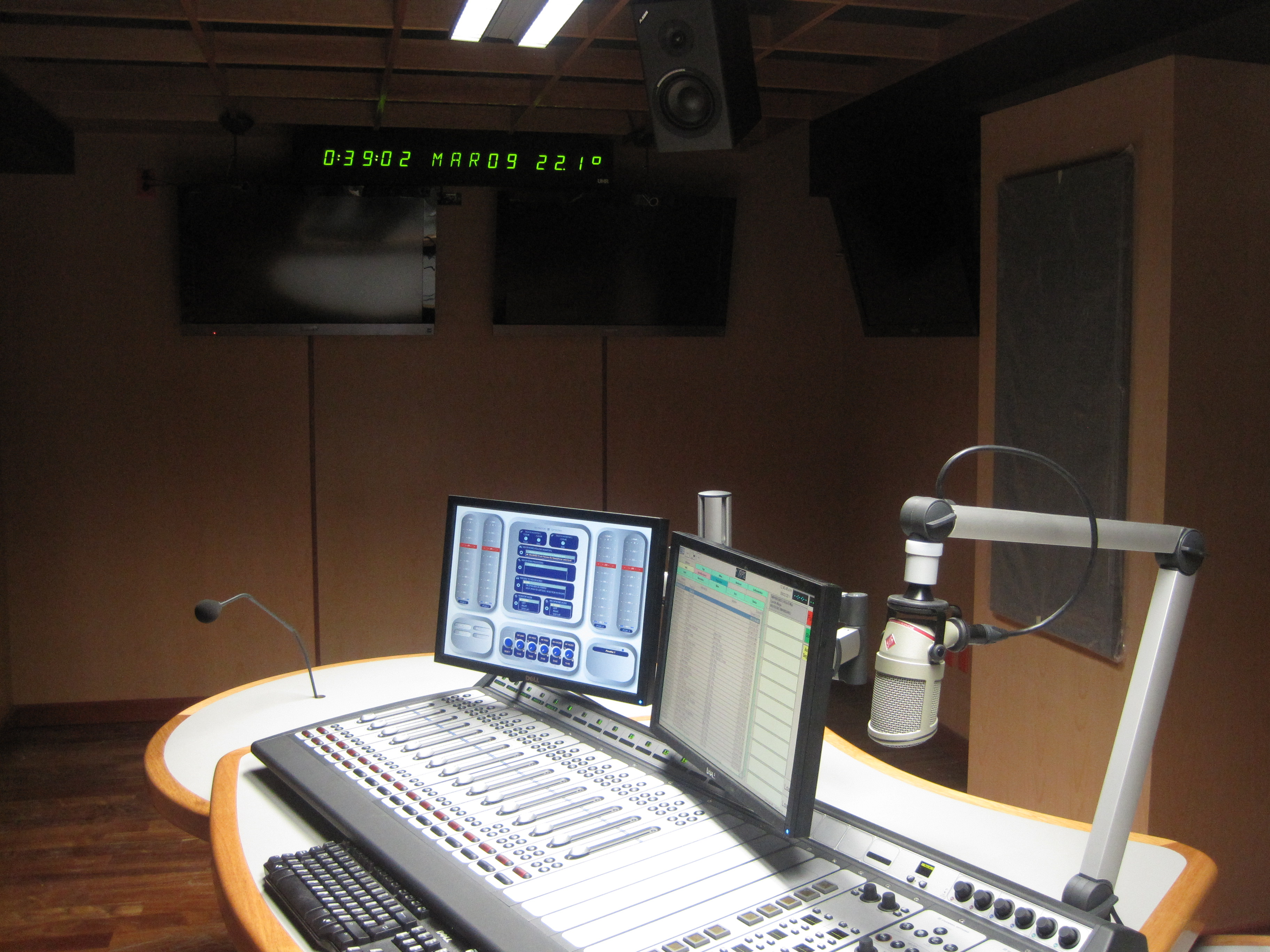 Cabina de Transmisión XHUAMR